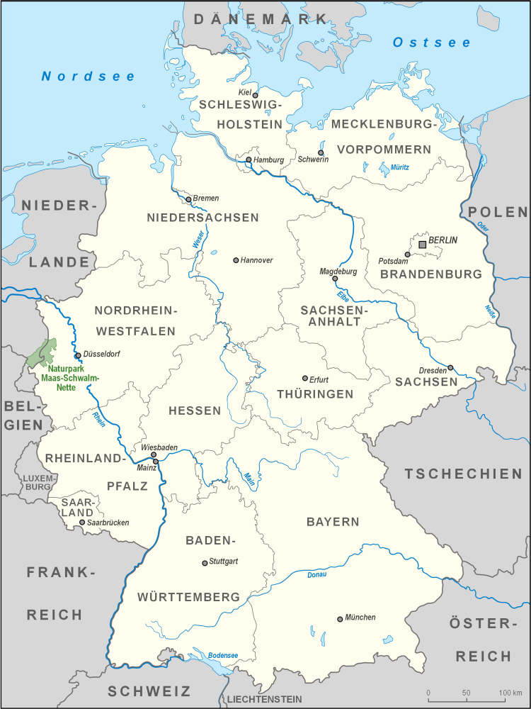 Karte des Naturparks Maas-Schwalm-Nette in Deutschland und Belgien